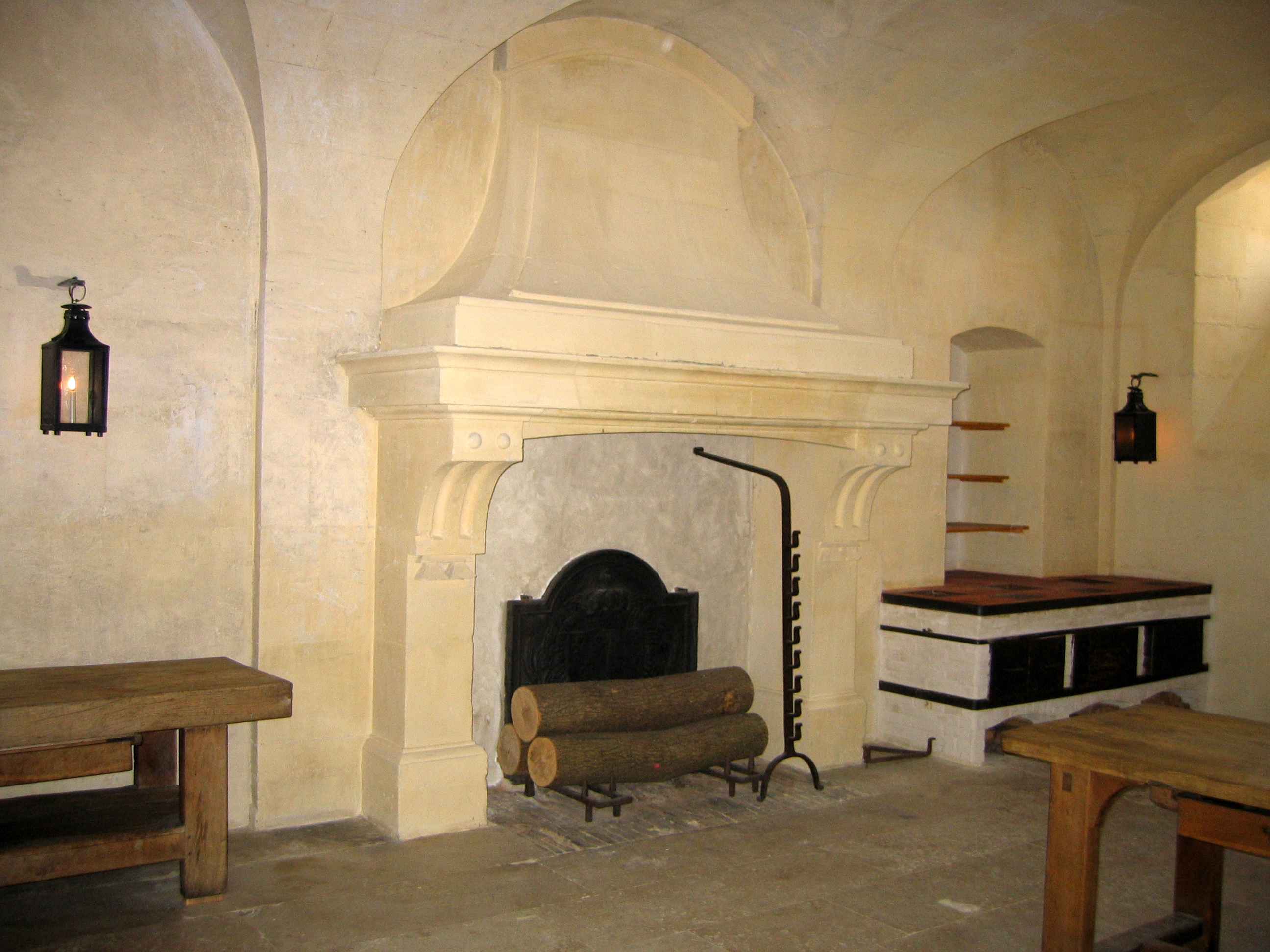 Dans le réchauffoir, les plats étaient réchauffés au moment d'être servis car ils étaient préparés ailleurs pour ne pas incommoder les résidents